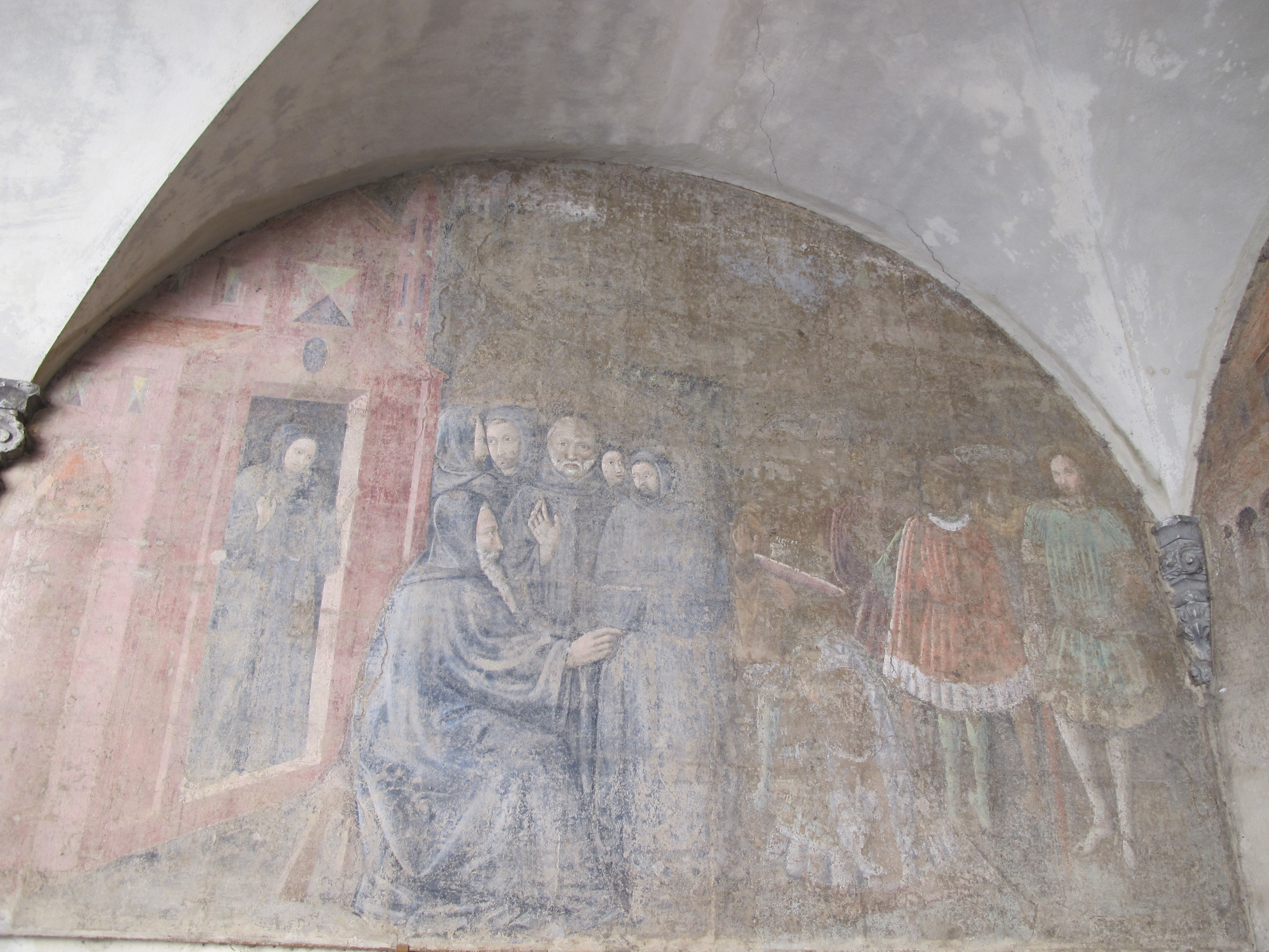 firenze, badia fiorentina